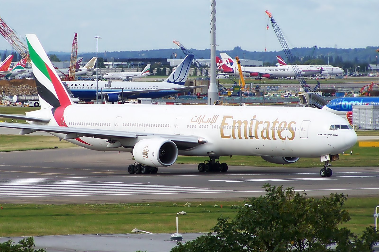 A6-EMS Boeing 777 Emirates